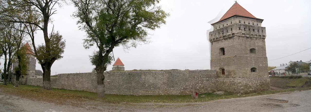 Скалатівський замок